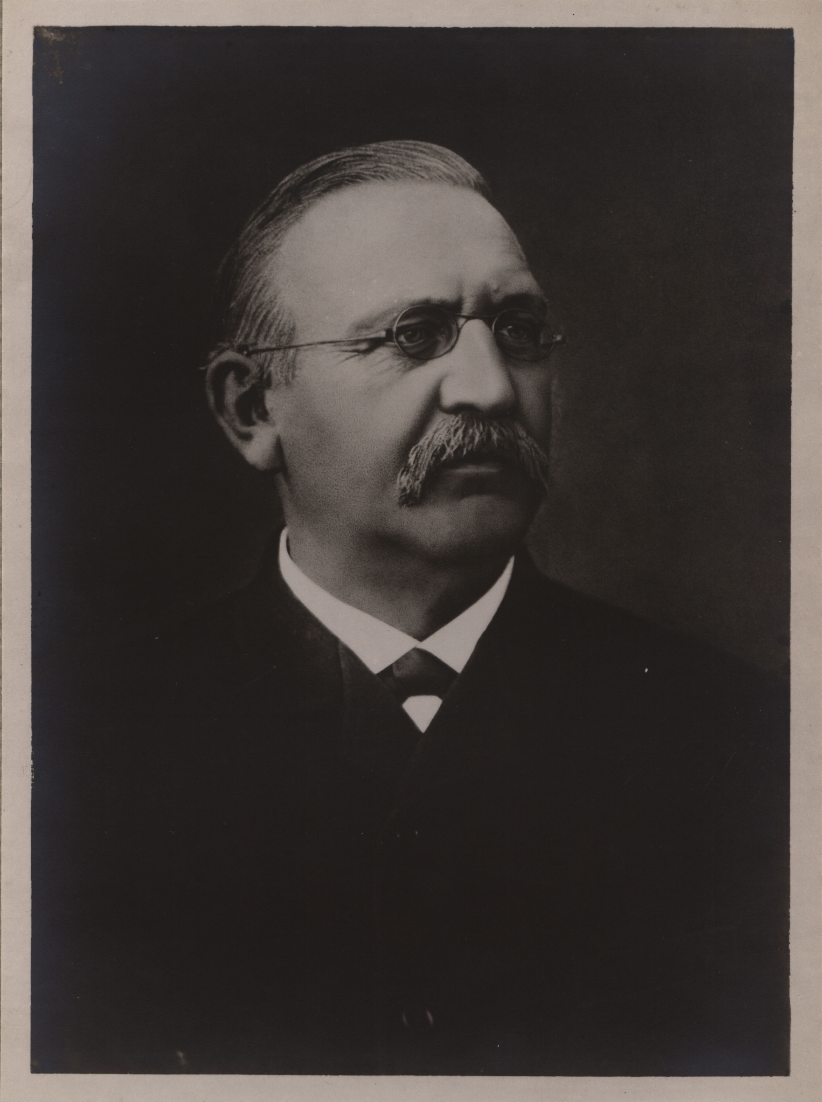 Ludwik Grohman, łódzki fabrykant i przemysłowiec